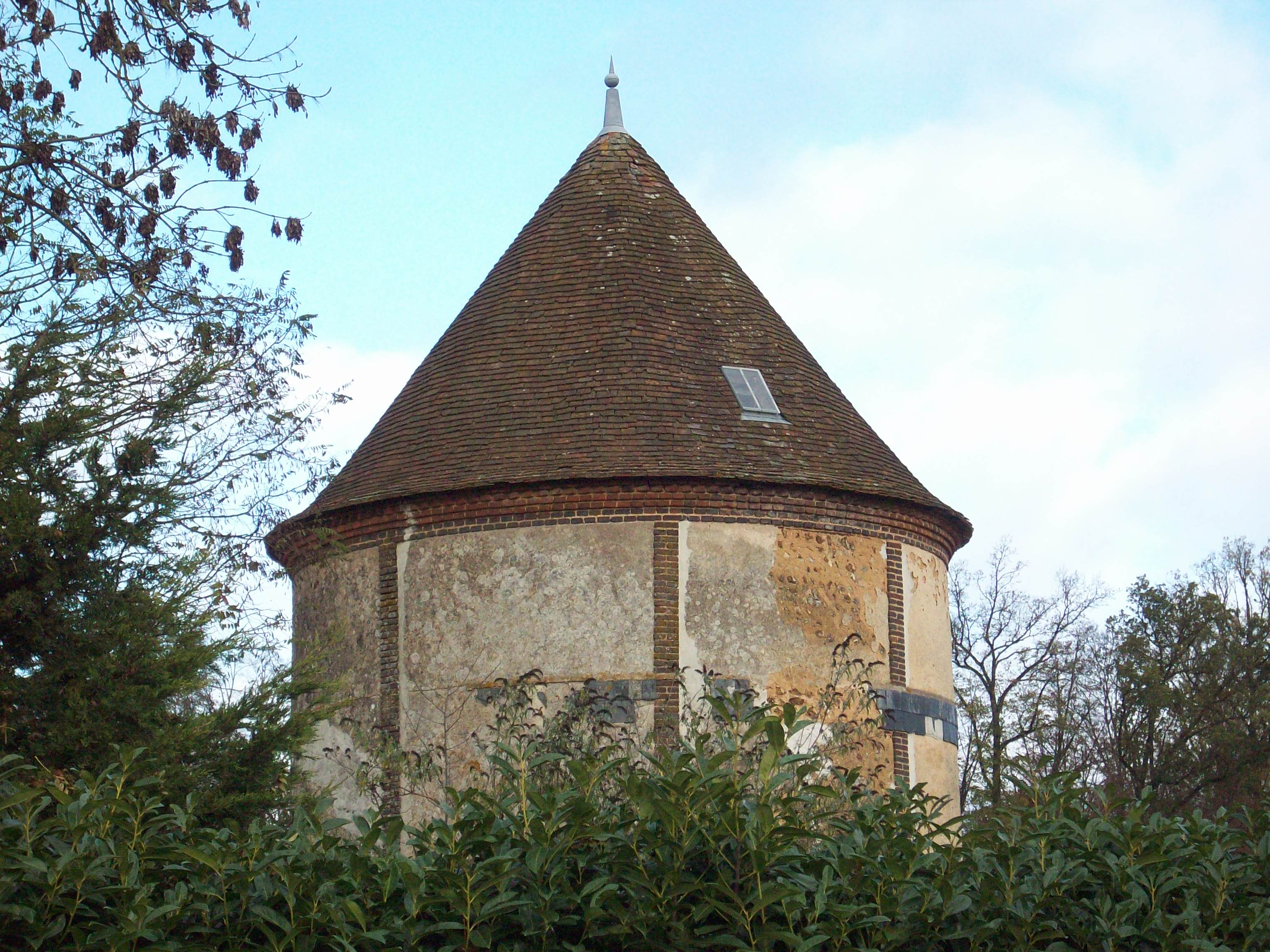 Colombier de Chennebrun.